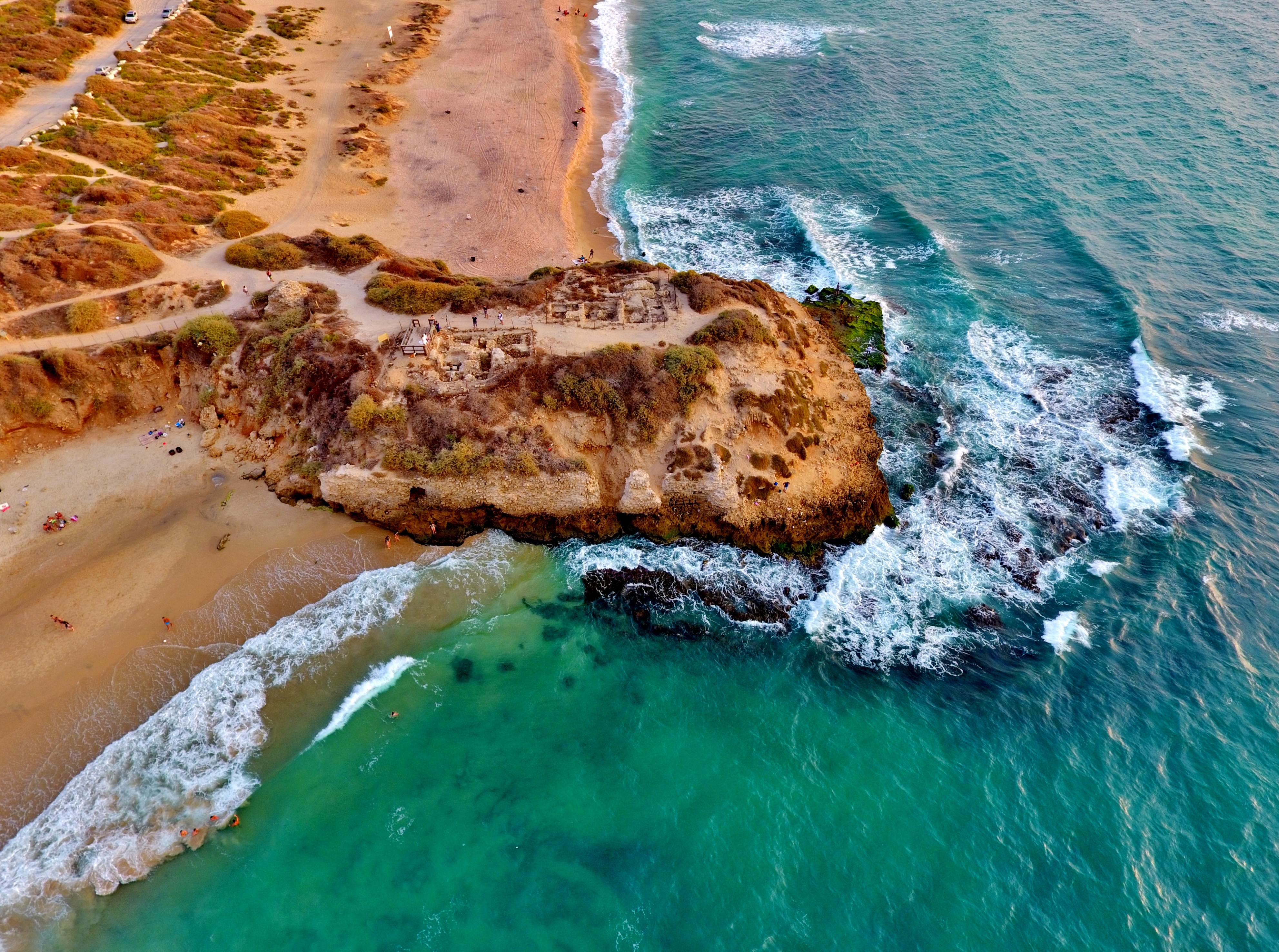 חוף פלמחים ממעוף הציפור